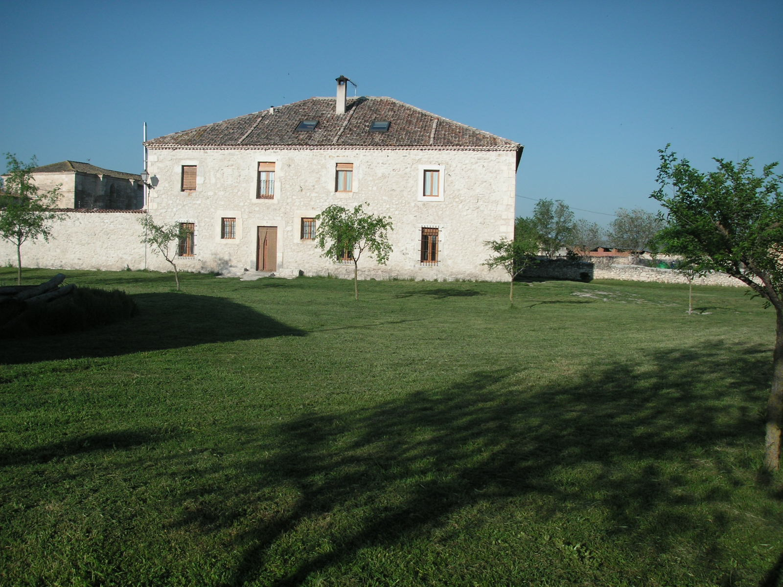 Casa Rural El lagar de Vegafría, Vegafría, Segovia, España